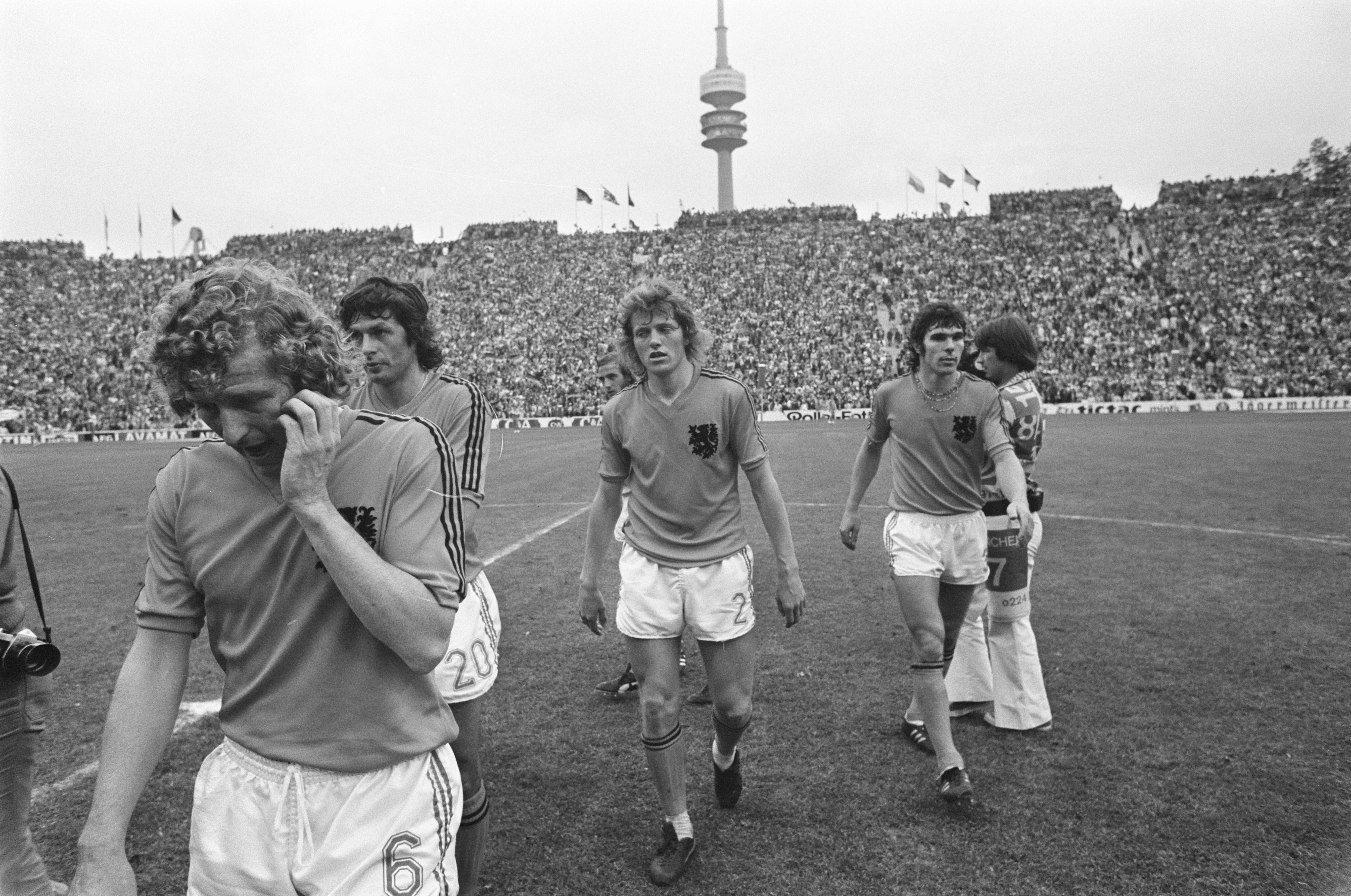 Collectie / Archief : Fotocollectie Anefo Reportage / Serie : [ onbekend ] Beschrijving : Finale wereldkampioenschap voetbal 1974 in Munchen, West Duitsland tegen Nederland 2-1; v.l.n.r. Wim Jansen Suurbier, Arie Haan en Wim van Hanegem / Datum : 7 juli 1974 Locatie : München, Nederland, West-Duitsland Trefwoorden : finales, sport, voetbal, wereldkampioenschappen Persoonsnaam : Haan, Arie, Jansen, Wim, Suurbier, Wim Fotograaf : Verhoeff, Bert / Anefo Auteursrechthebbende : Nationaal Archief Materiaalsoort : Negatief (zwart/wit) Nummer archiefinventaris : bekijk toegang 2.24.01.05 Bestanddeelnummer : 927-3078